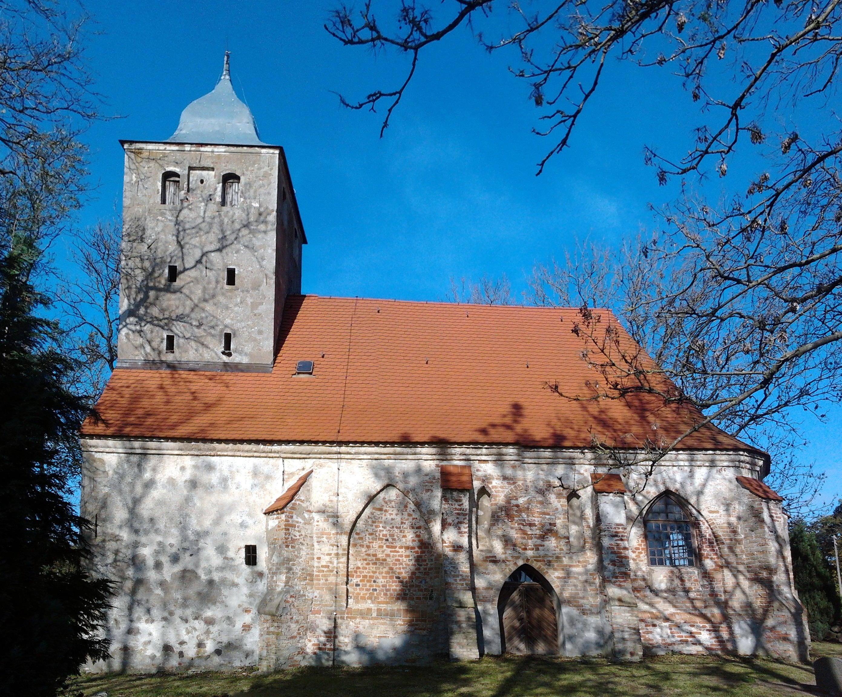 Kagenow, Gemeinde Neetzow, Südseite der Kirche